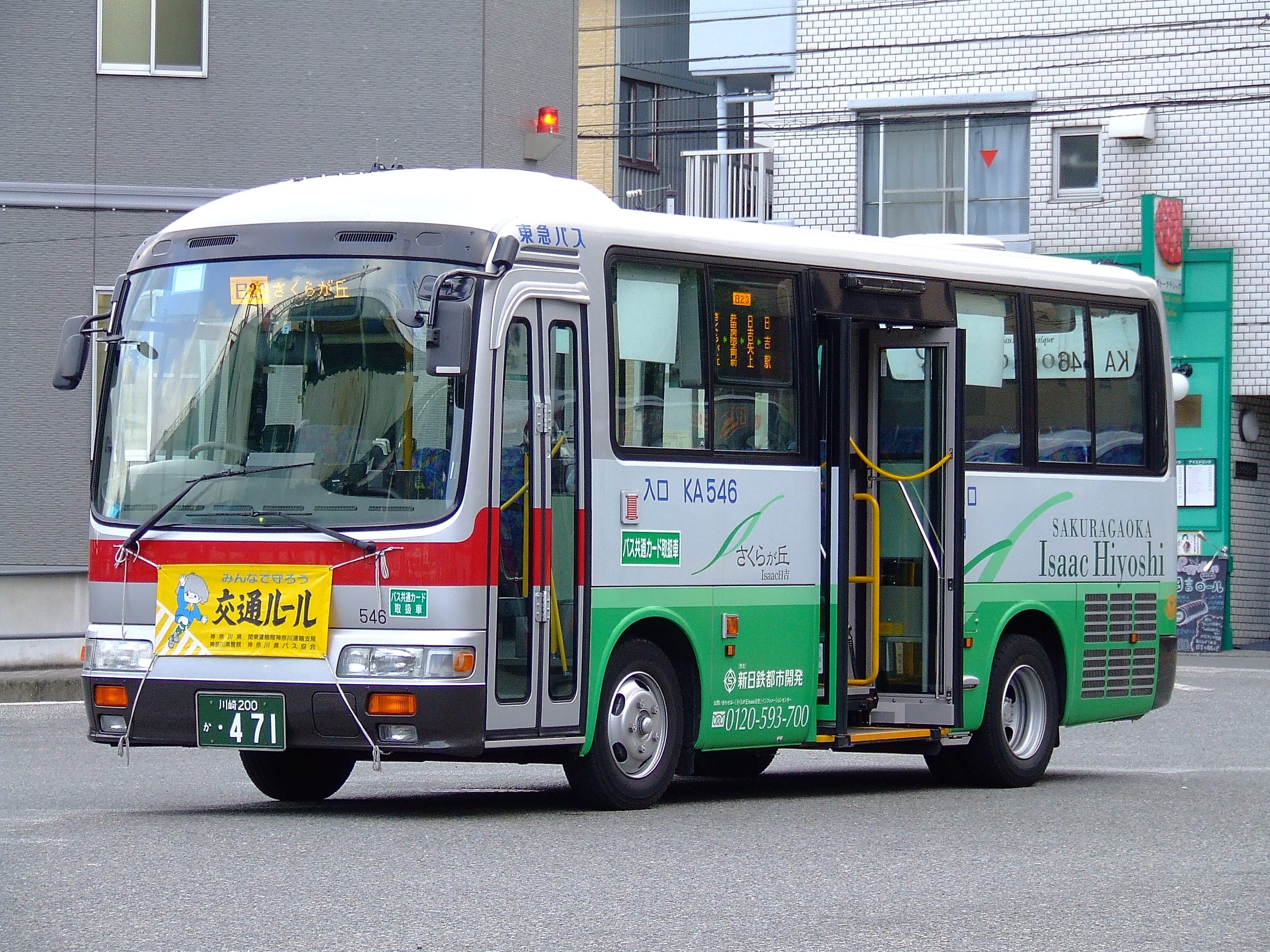 東急バス川崎営業所KA546号車（日23系統専用） 日野・リエッセ